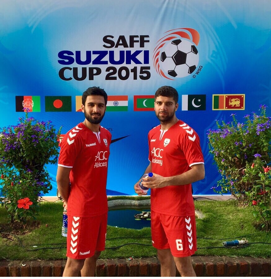 Kani Taher (links) mit seinem Teamkollegen Anoush Dastgir zum Auftakt des SAFF Suzuki Cup 2015, der offiziellen Südasienmeisterschaft